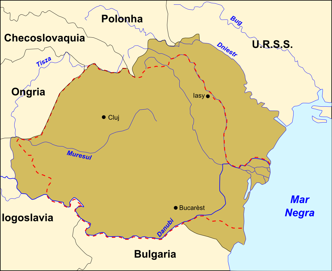 Romania en 1925.